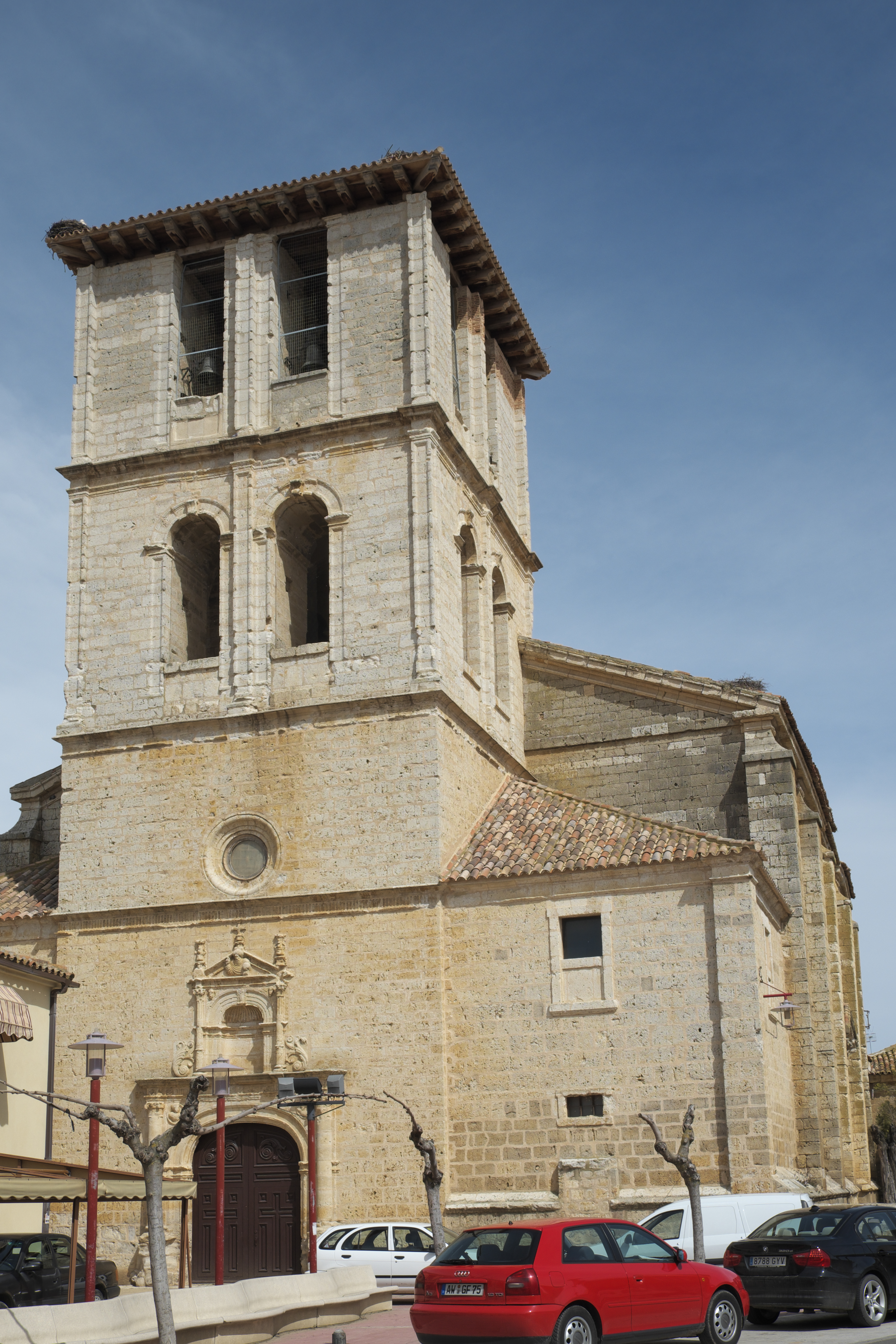 Pfarrkirche Santa María in Villabrágima in der Provinz Valladolid (Kastilien-León/Spanien), aus dem 16./17. Jh.